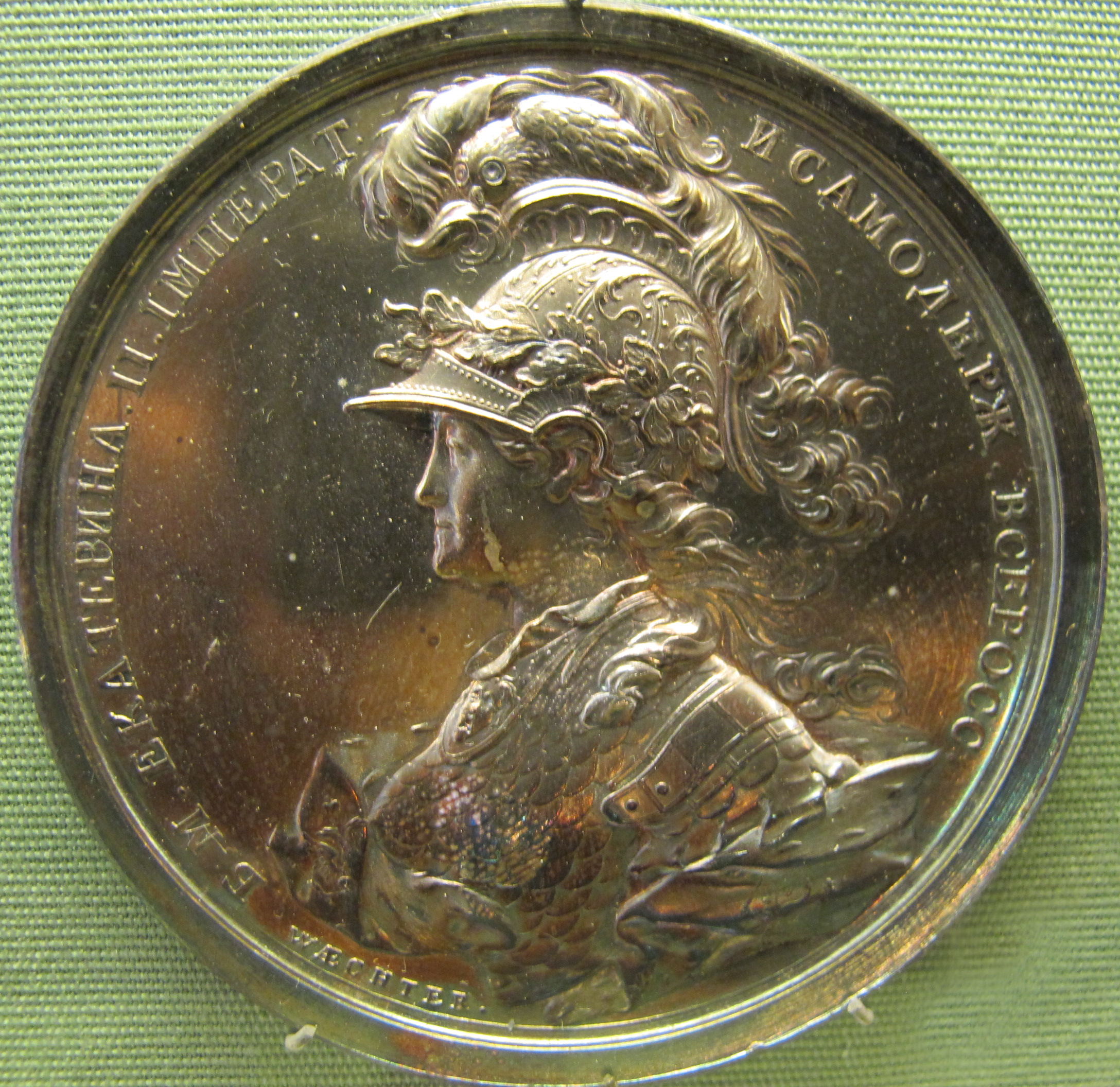 Caterina II di Russia, arg, 1762